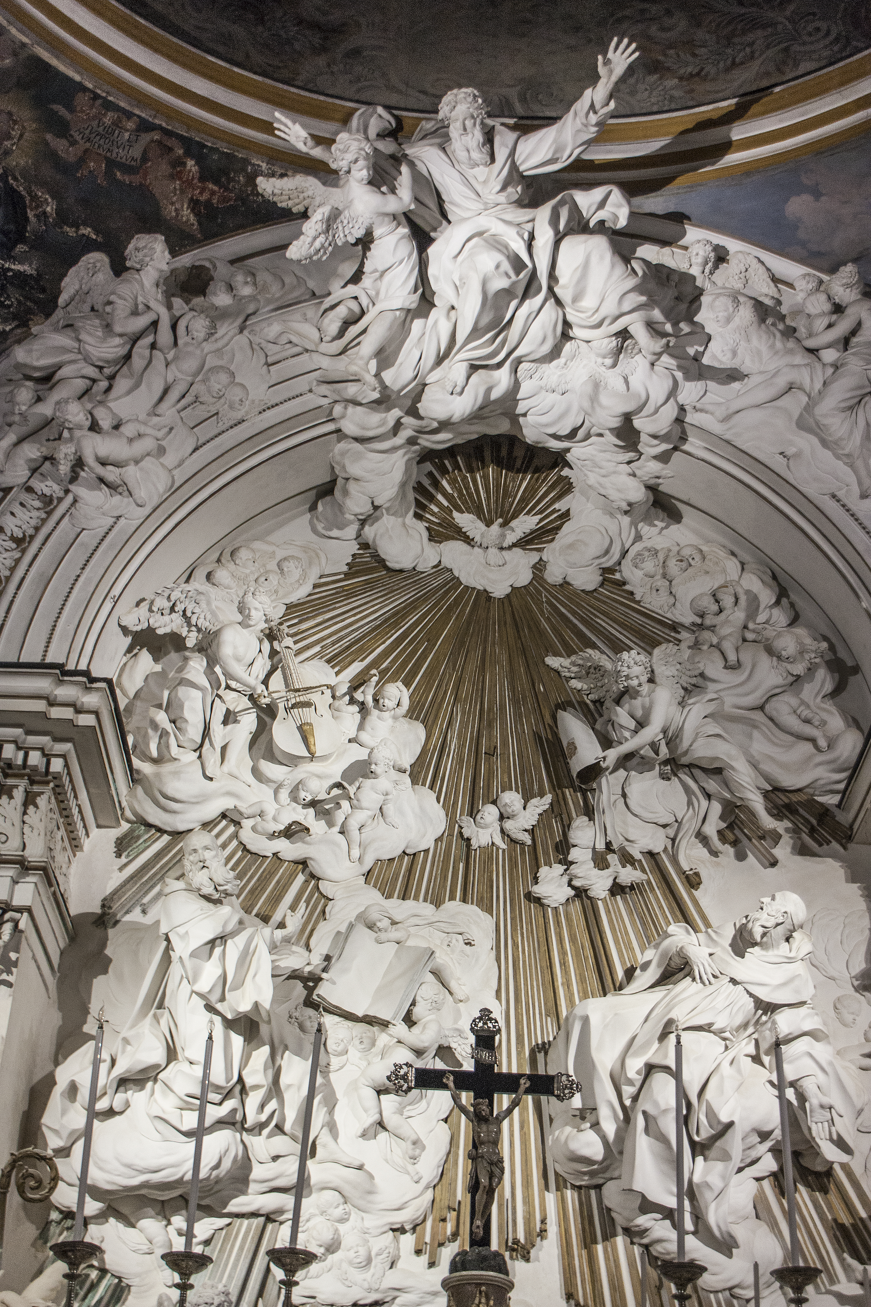 Serpotta - stucchi altare chiesa di Santo Spirito